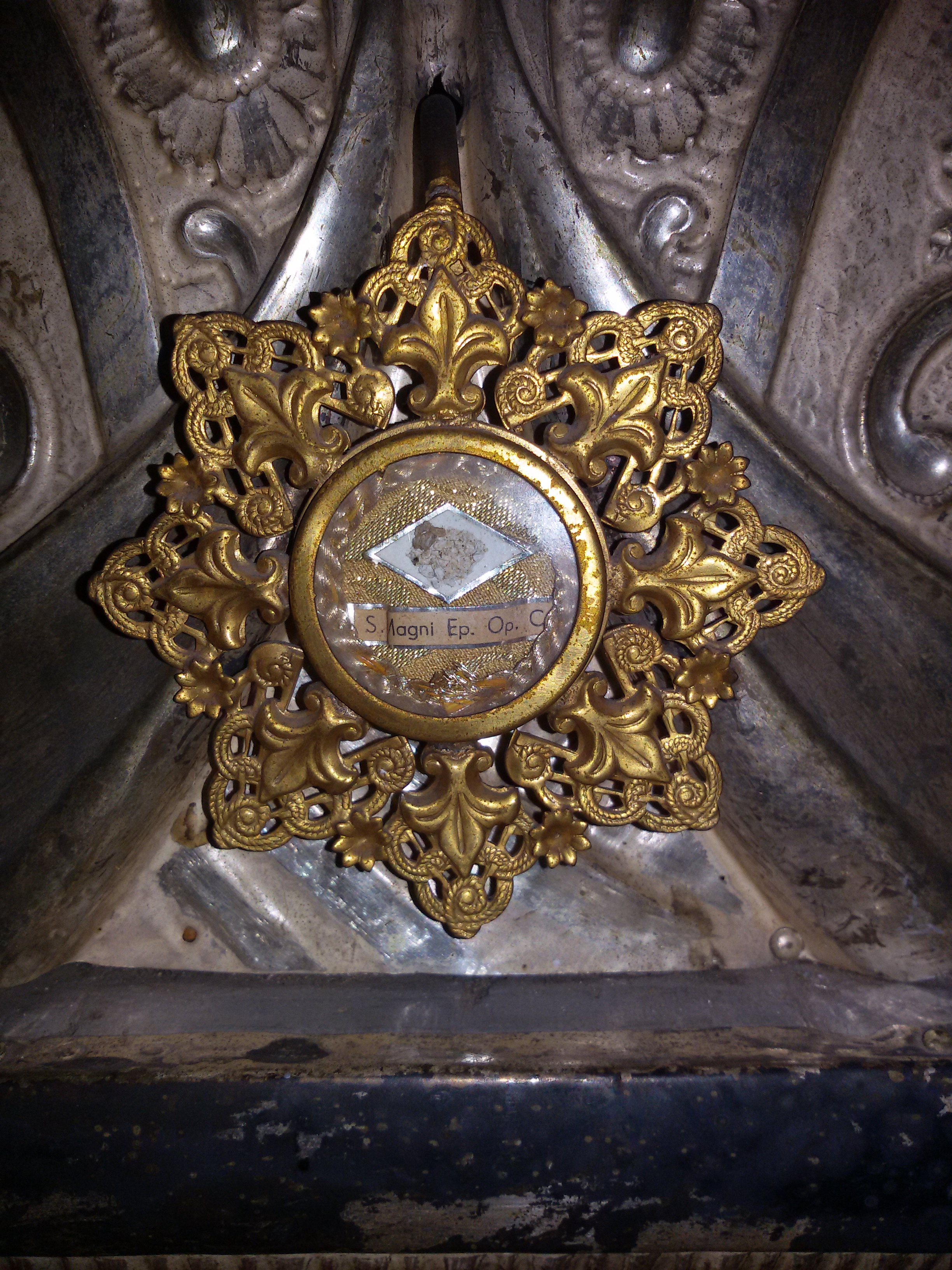 Santa Cristina Vergine e Martire del Tiverone